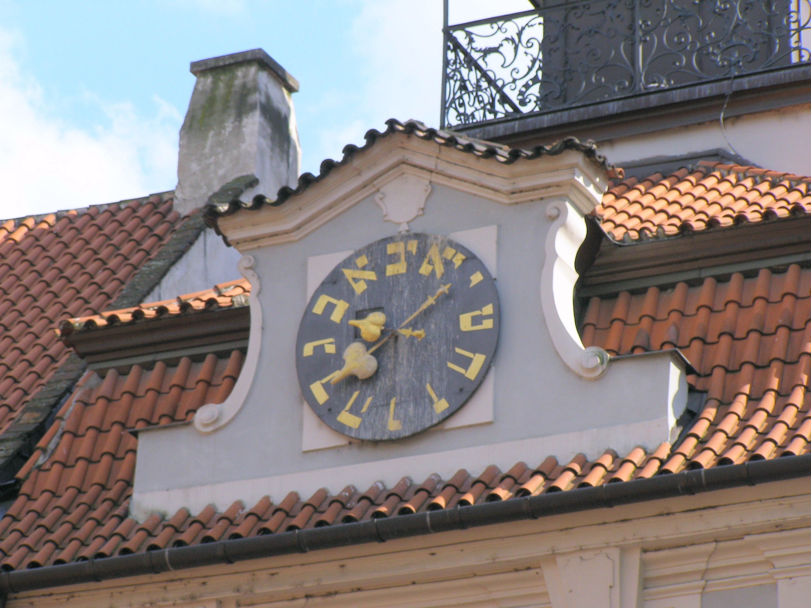 Hohe Synagoge (Vysoká synagoga) Prag, Detail der Uhr (die Ziffern sind entgegen dem Uhrsinn angeordnet)